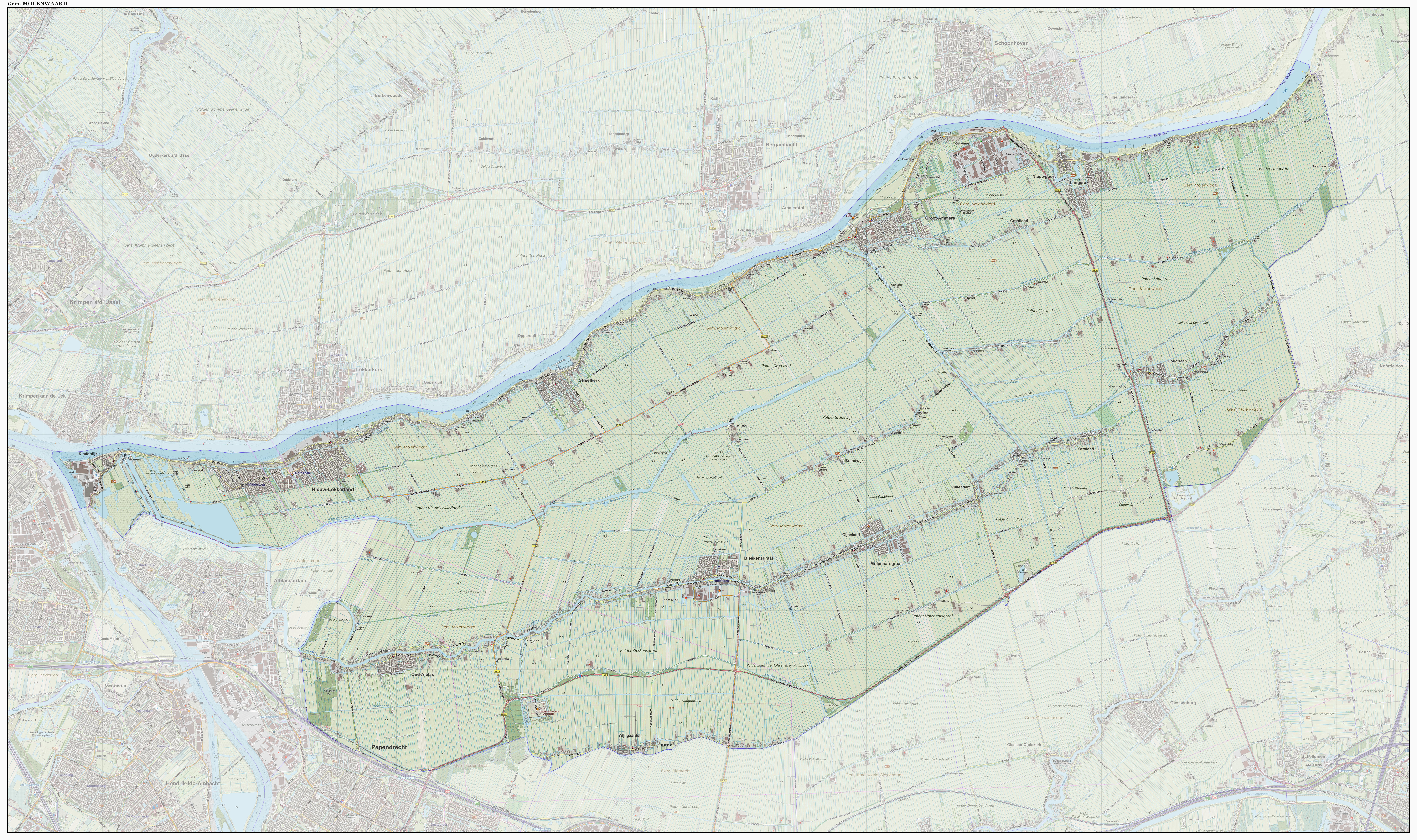 Topografische gemeentekaart. Resolutie: 400 pixels/km. Kaartbeeld samengesteld uit de open geodata van de Top10NL en Top25namen (Kadaster), Creative Commons-BY licentie. Gebouwvlakken uit open geodata BAG extract. Wegen uit de OpenStreetMap, OpenStreetMap community. Reliëfschaduw uit de Actuele Hoogtekaart AHN2. Samenstelling en kleurenschema: Jan-Willem van Aalst, met QGIS. Zie ook de Legenda.